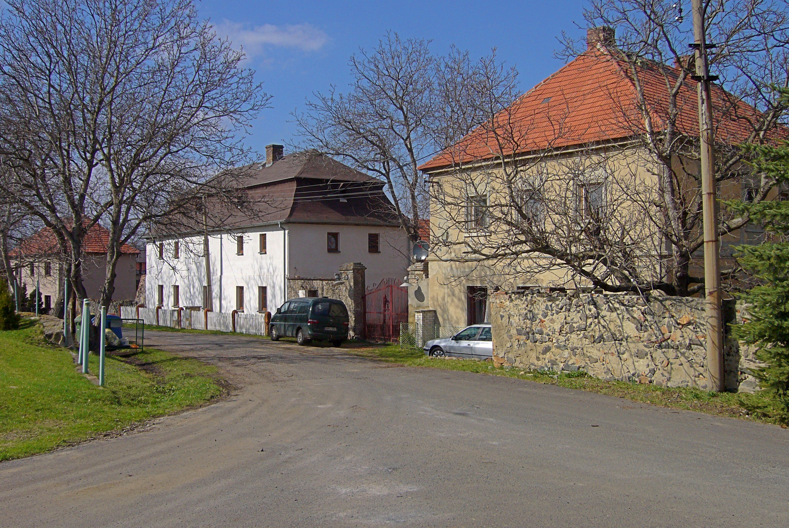 Chrašťany - usedlost čp. 22